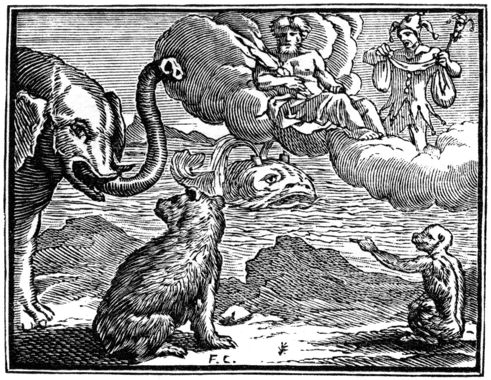 Illustrations pour les « Fables choisies mises en vers par M. de la Fontaine », Claude Barbin et Denys Thierry, Paris, 1668 (premier recueil) 1678-79 (deuxième recueil) 1694 (troisième recueil). Numérotation Charpentier (1705).